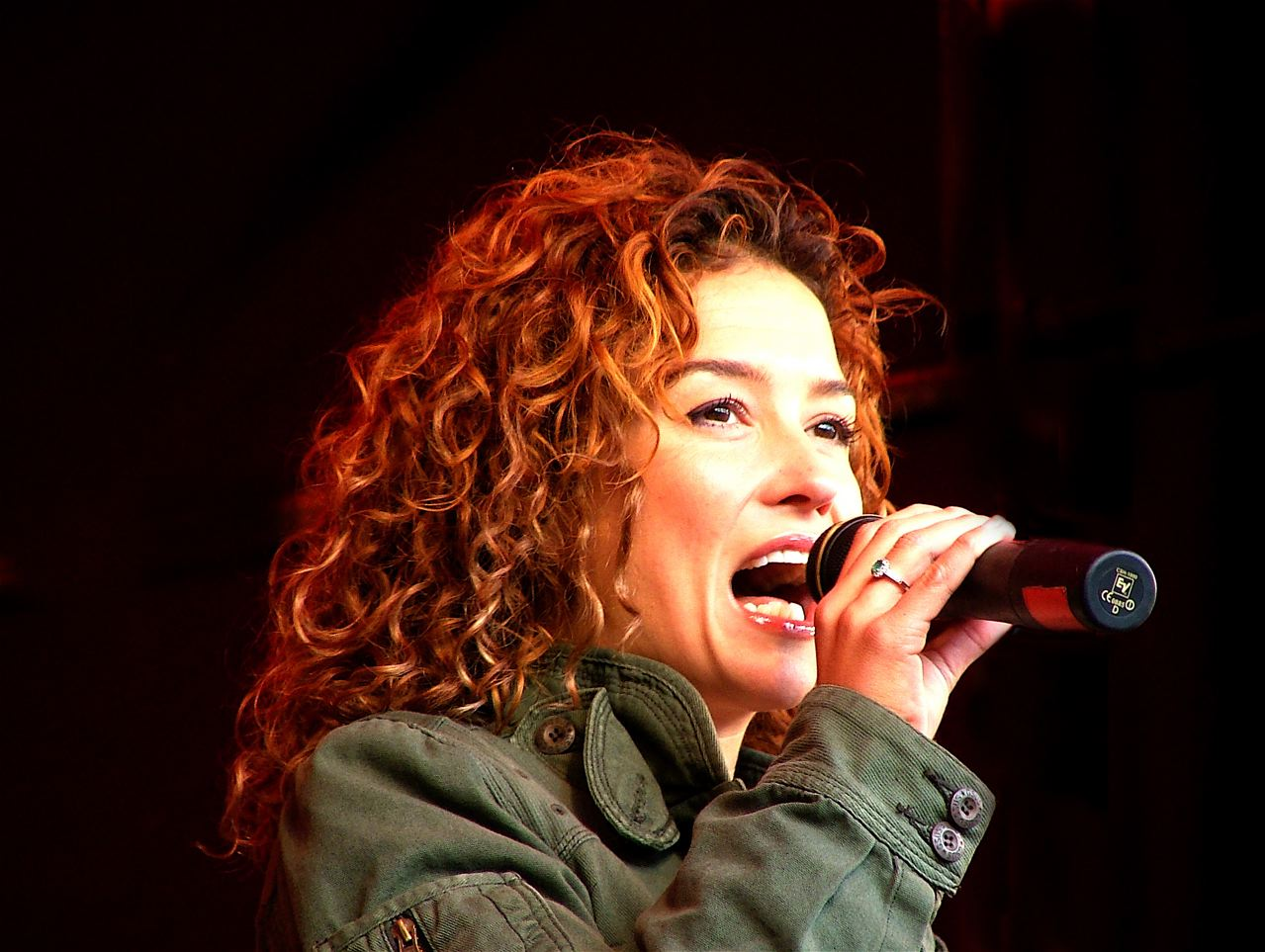 Geen Katja om zonder handschoenen aan te pakken